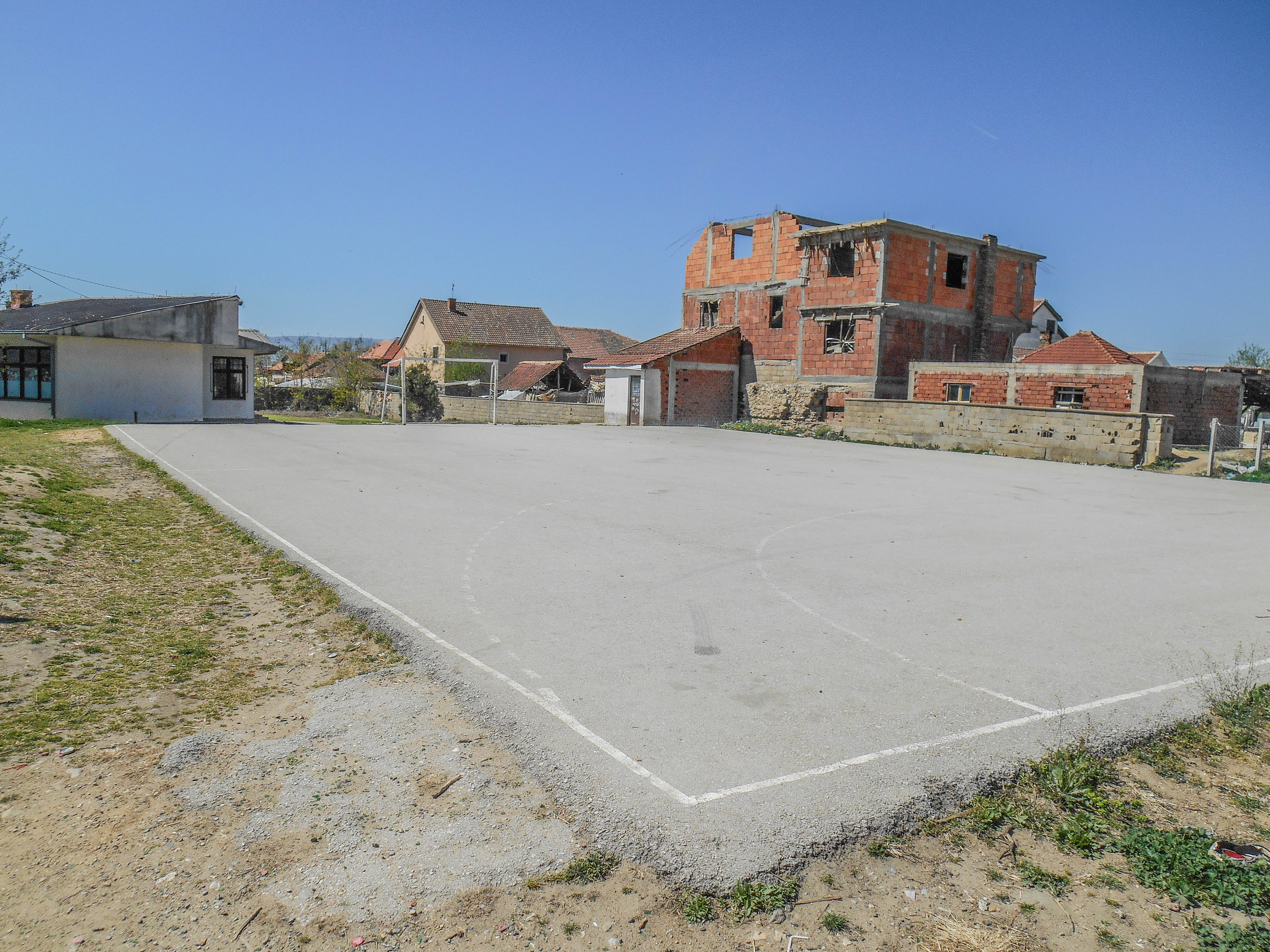 Основно училиште „Кољо Китанов“ - Сарај